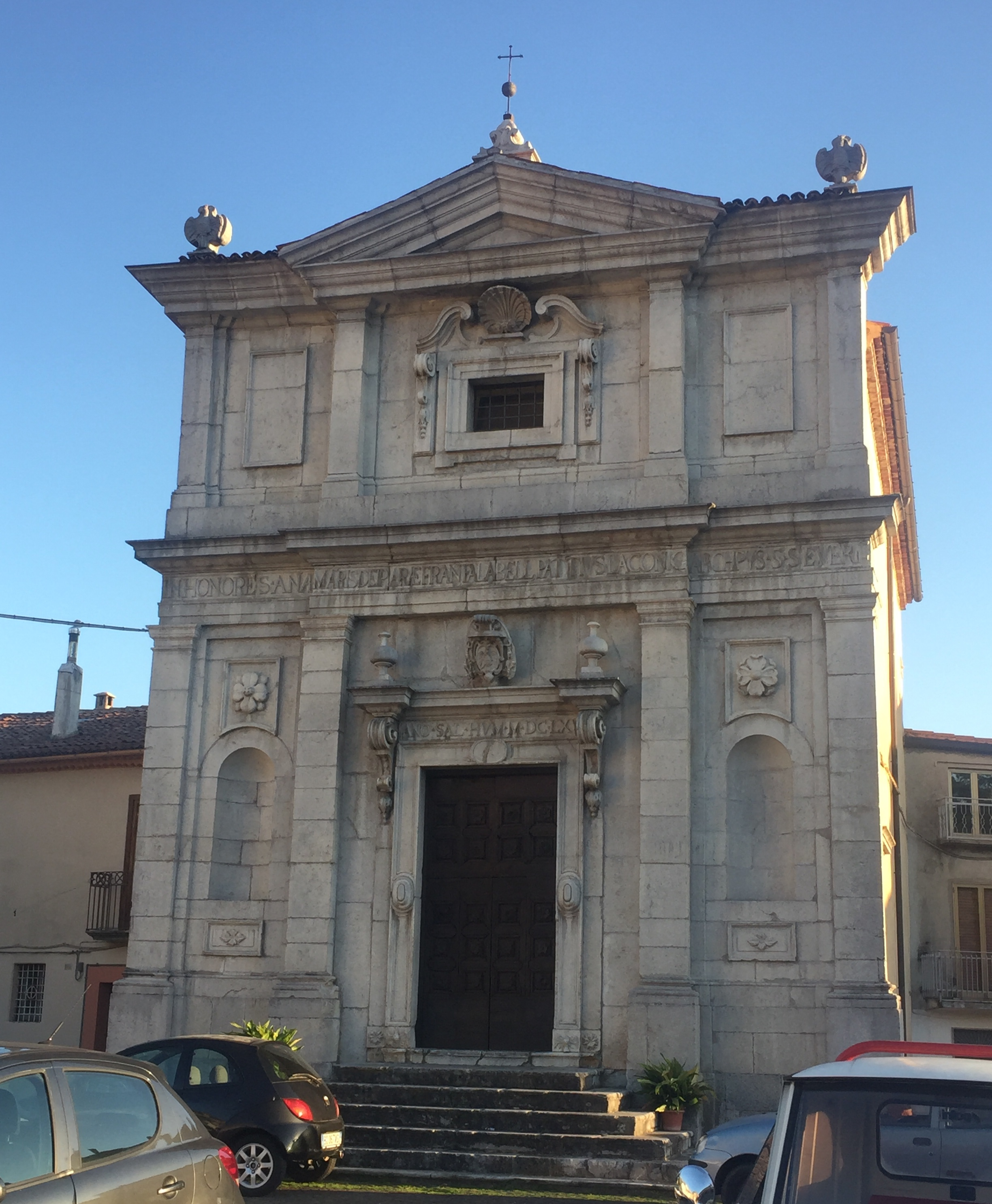 Chiesa di S.Anna Monumento nazionale